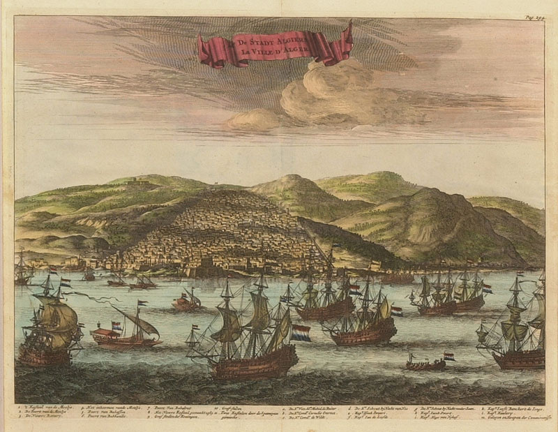 Stoopendael (1636–1707): „De Stadt Algiers / La Ville d'Alger”. Copperplate print, colorized, c. 1680/1690, 26 × 34 cm